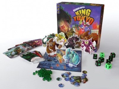 Jeu de société king of tokyo